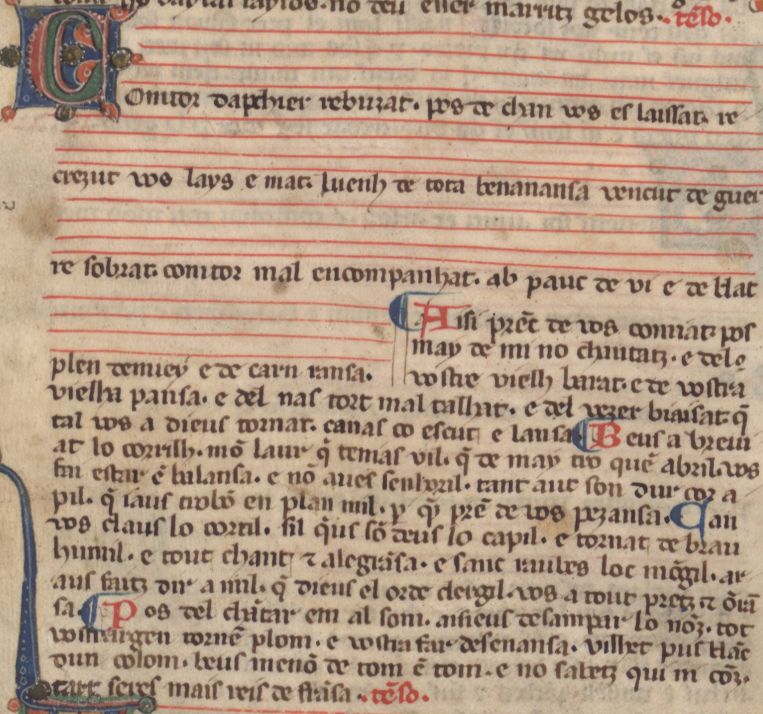 Tenson de Torcafol à son rival Garin d'Apchier dans un chansonnier provençal (Chansonnier La Vallière) : Comtor d’Apchier rebuzat, pos del chan vos es laissat, recrezut vos lais e mat, loing de tota benanansa, vencut de guerr’e sobrat, comtor mal encompanhat, ab pauc de vi e de blat, plen d’enoi e de carn ransa. Aisi prenc de vos comjat, pos mai de mi no chantat, e del vostre vielh barat, e de vostra vielha pansa, e del nas tort, mal talhat, e del vezer biaisat, que tal vos a Dieus tornat c’anas co escut e lansa. Be·us a breviat lo corril Monlaurs, que tenias vil, que de mai tro en abril vos fai estar en balansa; e non aves senhoril tant aut so dur cor apil, que ja·us trobon en planil, per que·m pren de vos pezansa. Et an vos claus lo cortil sil que·us son deus lo capil, e tornat de brau humil e tout chan et alegransa; e s’anc raubes loc mongil ara·us faitz dire a mil que Dieus e l’orde clergil vos an tout pretz et onransa. Pos del chantar em al som aisie·us desampar lo nom; totz vostr’argens torn’en plom e vostr’afars desenansa. Vilhetz pus blancs d’un colom, be·us menon de tom en tom, e no sabetz qui ni com. Tart seres mais reis de Fransa! (